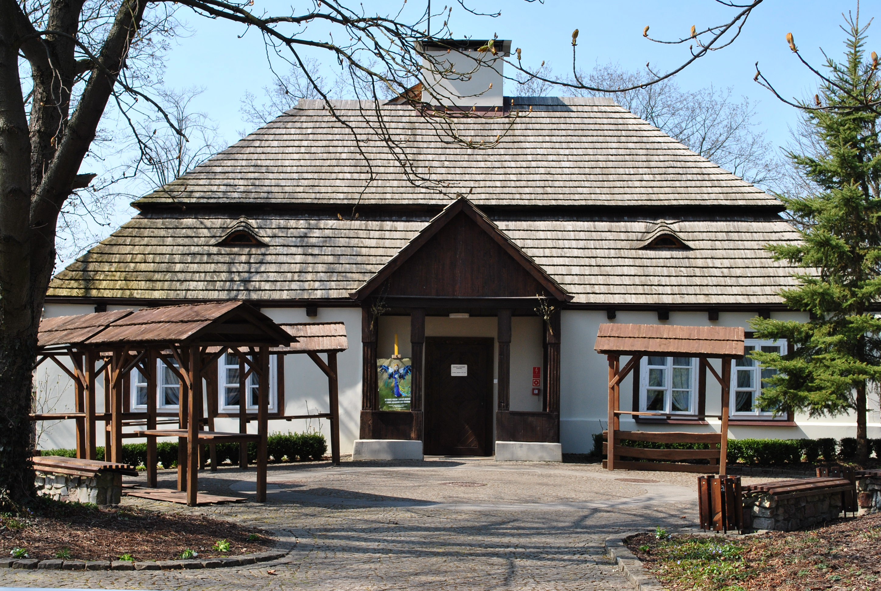 Dworek Laszczyków w Kielcach – siedziba Muzeum Wsi Kieleckiej